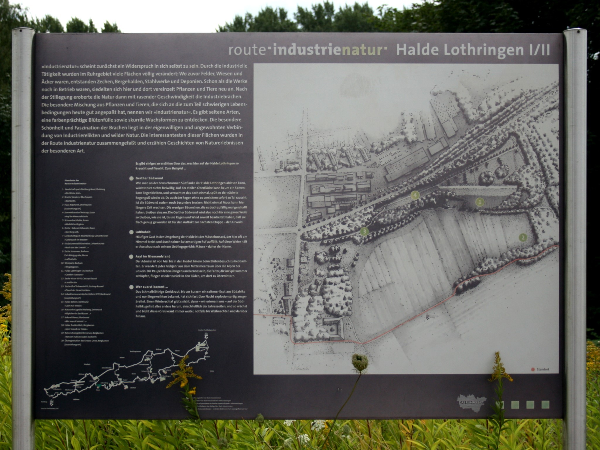 Halde Lothringen in Bochum